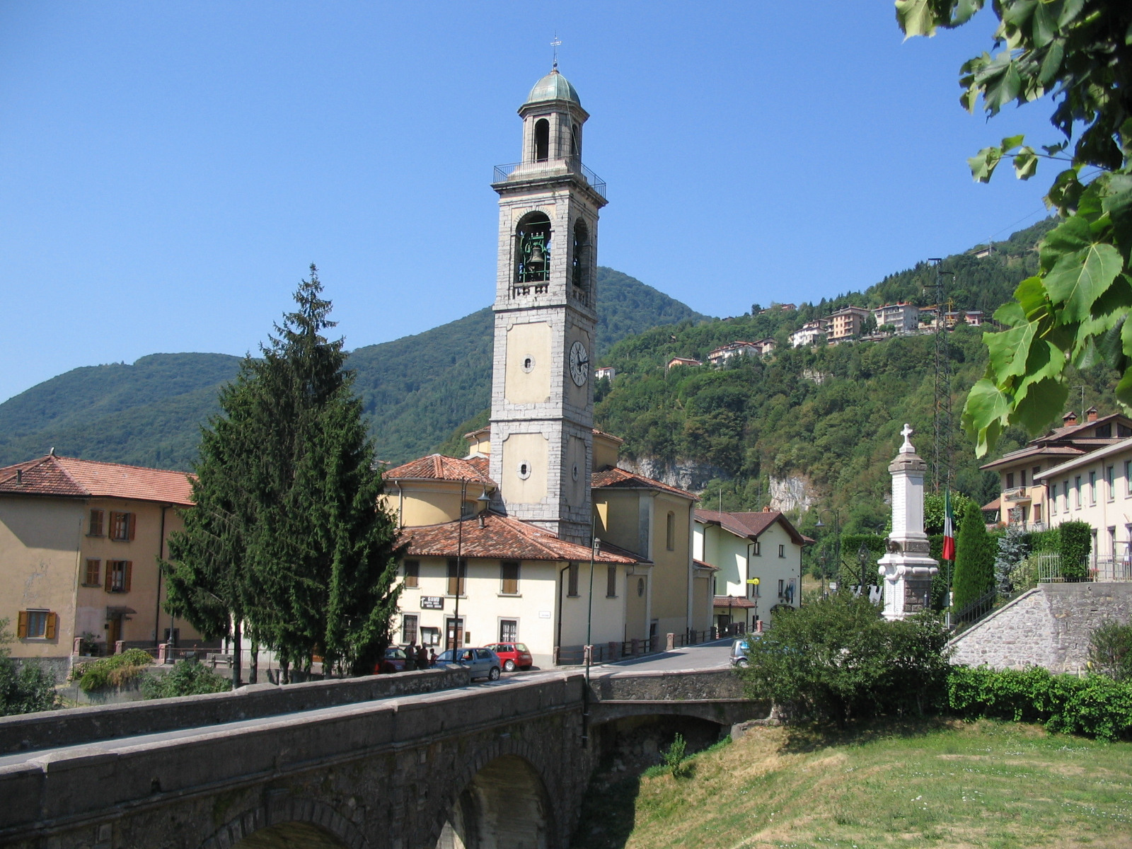 Autore Giorces. Ubiale Clanezzo, panorama.